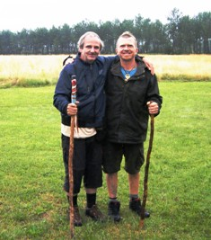 Deux cheminants vers Compostelle.